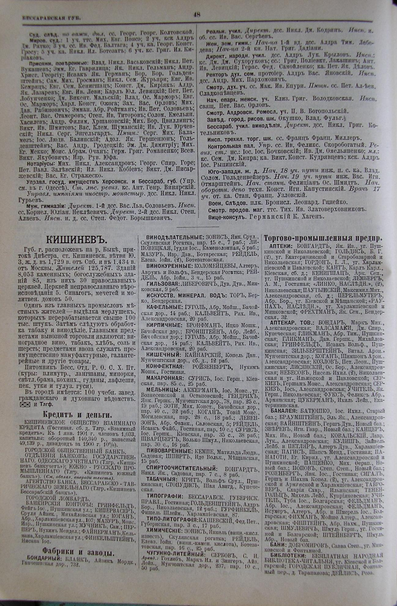 Стр. 48 (Кишинёв) из адрес-календаря Российской империи "Вся Россия", 1902.